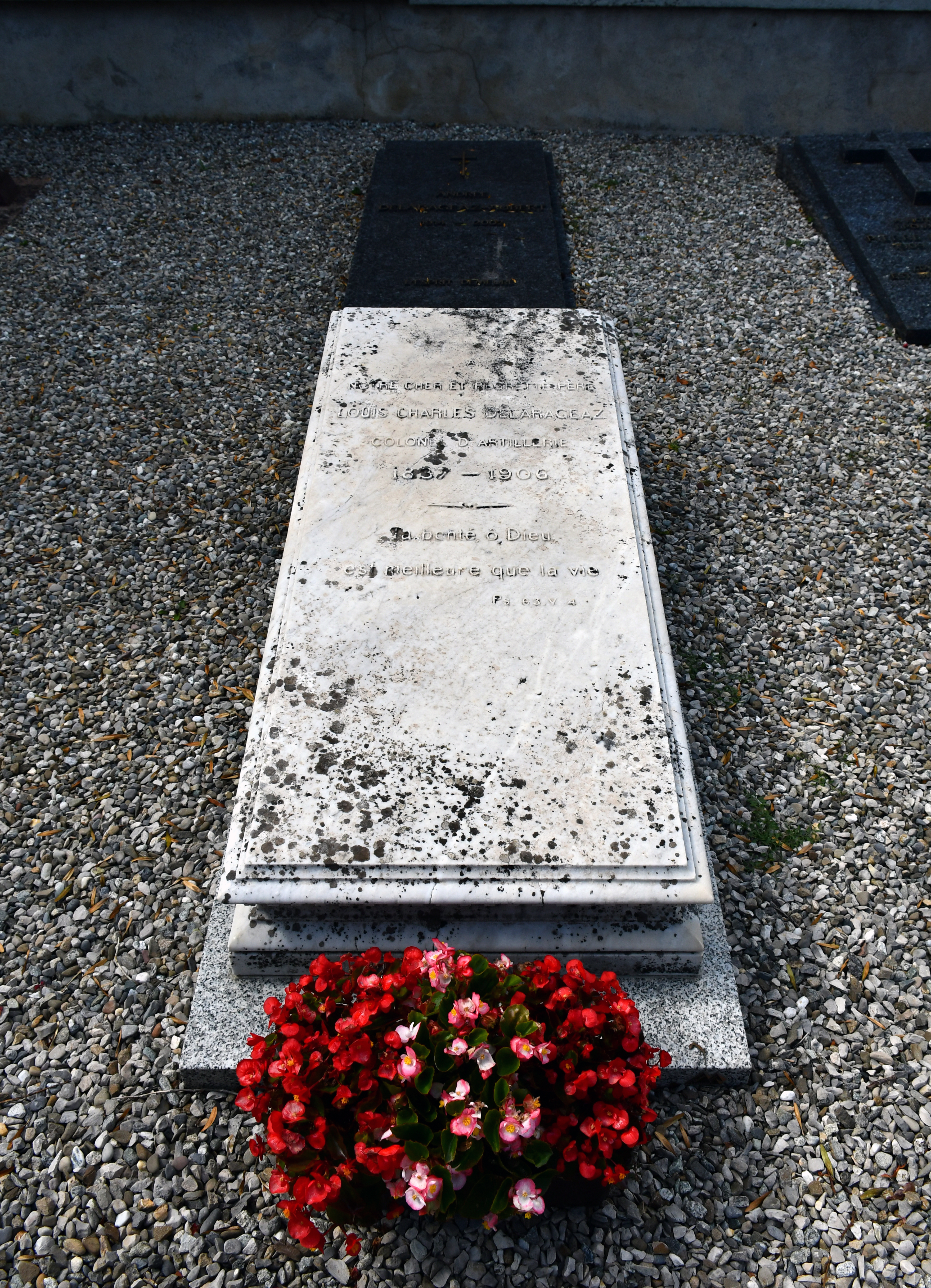 Tombe de Louis-Charles Delarageaz, général et homme politique suisse, dans le cimetière de Préverenges (Suisse).